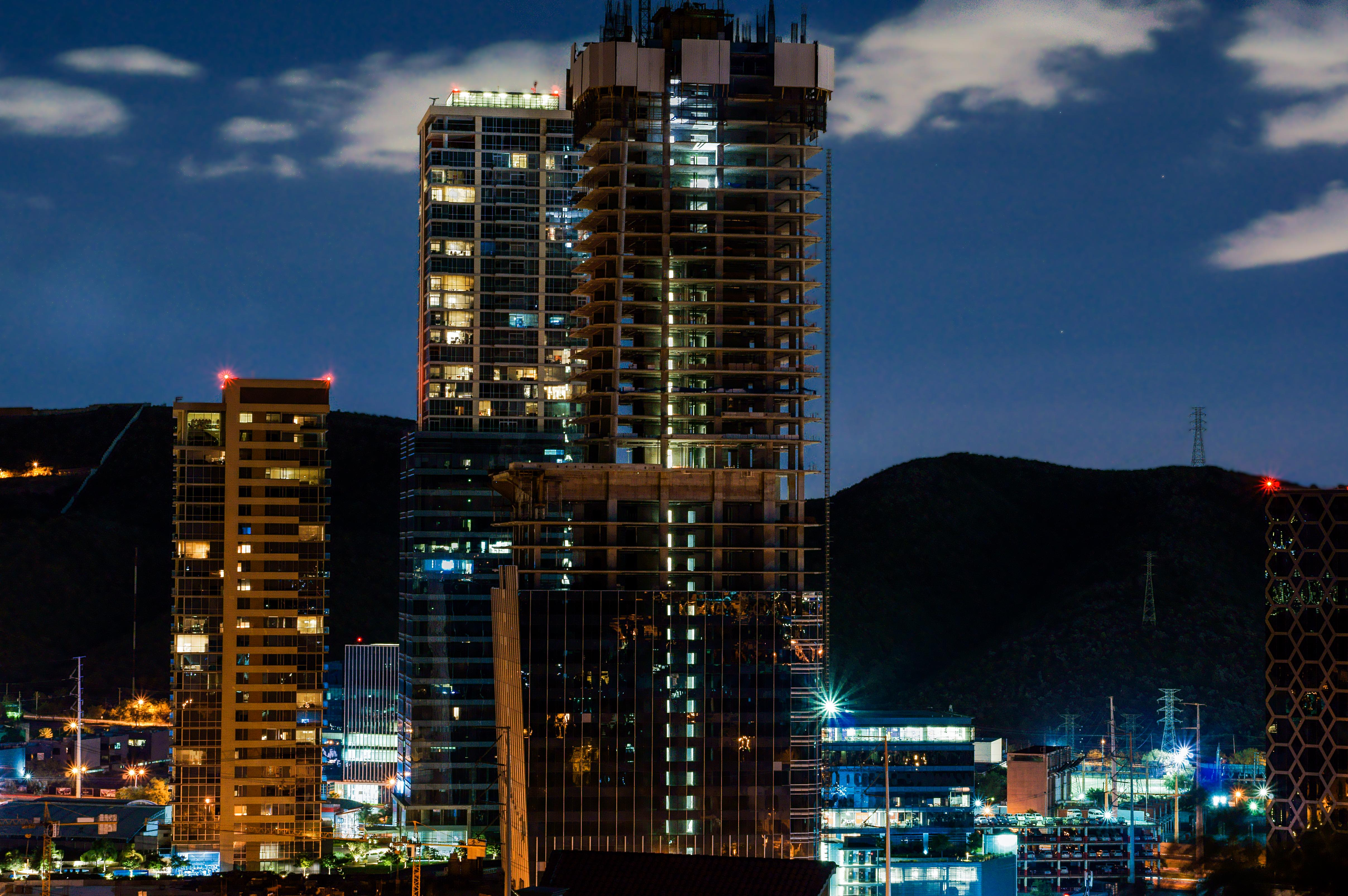 Valle Oriente.